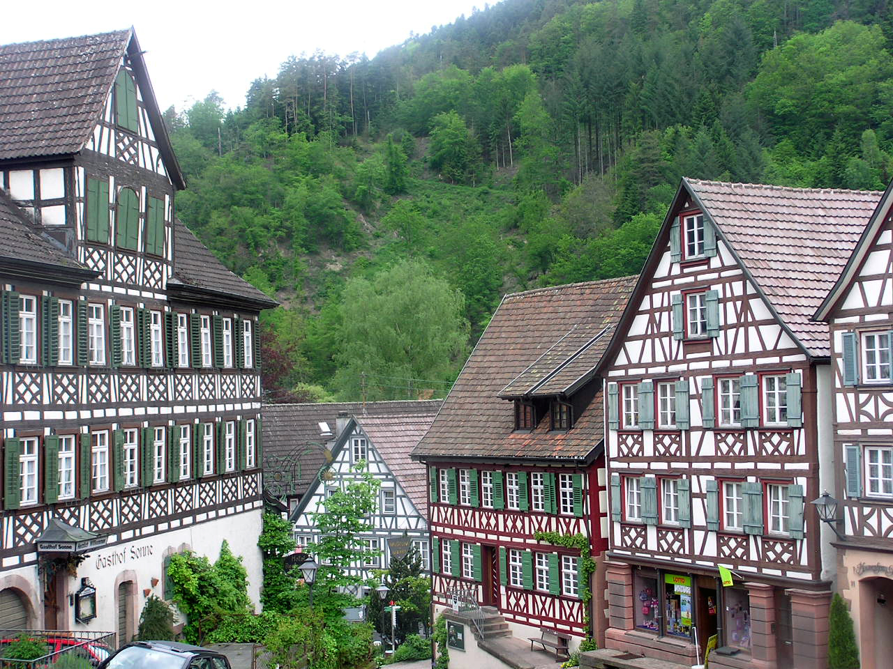 Fachwerkhäuser in Schiltach